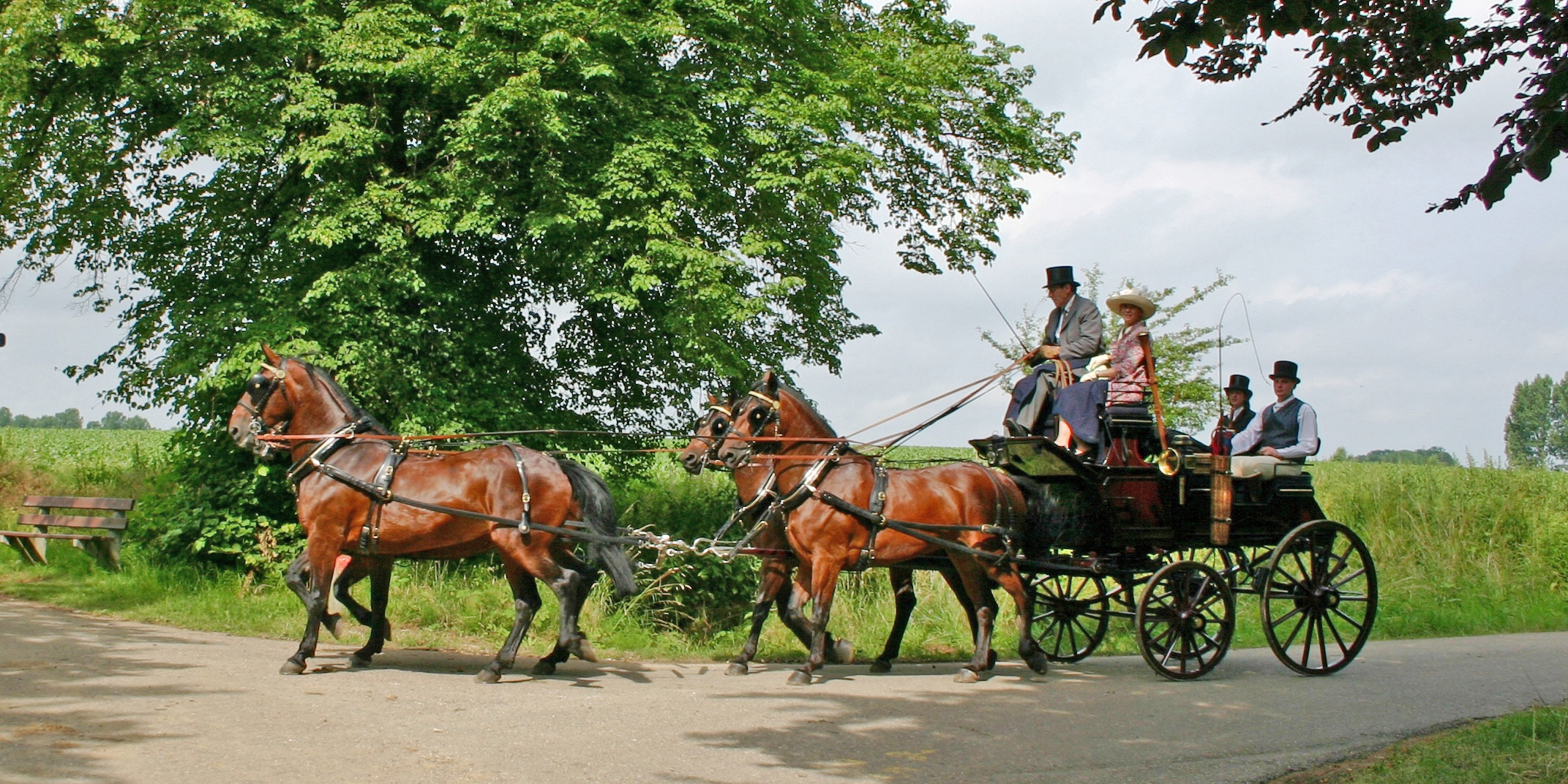 Cleveland Bay Gespan